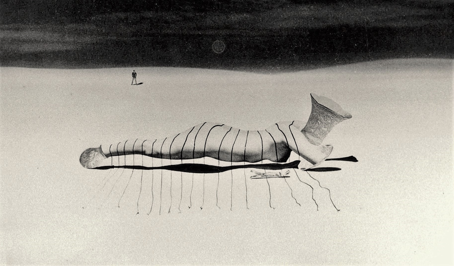 山本悍右 1938年 名古屋市美術館蔵